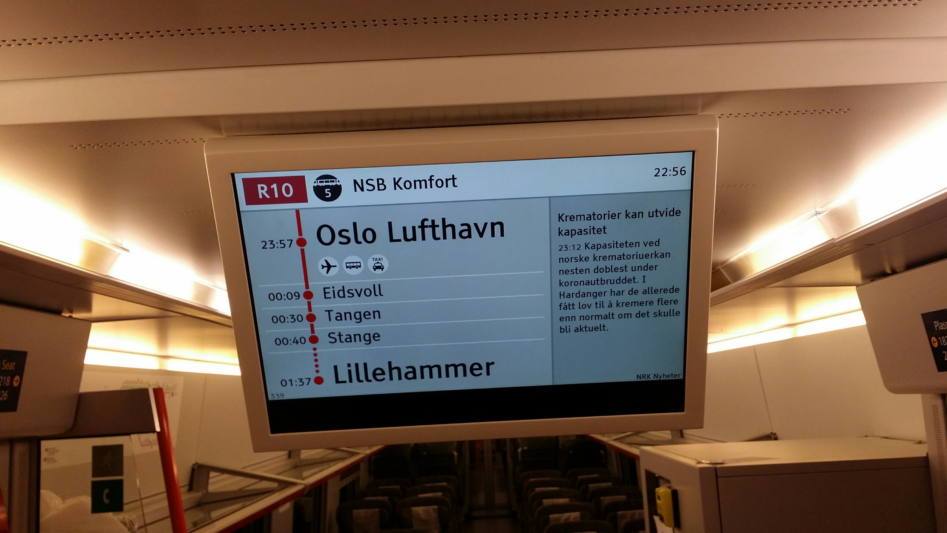 Informasjonsskjerm på Lillehammer-toget